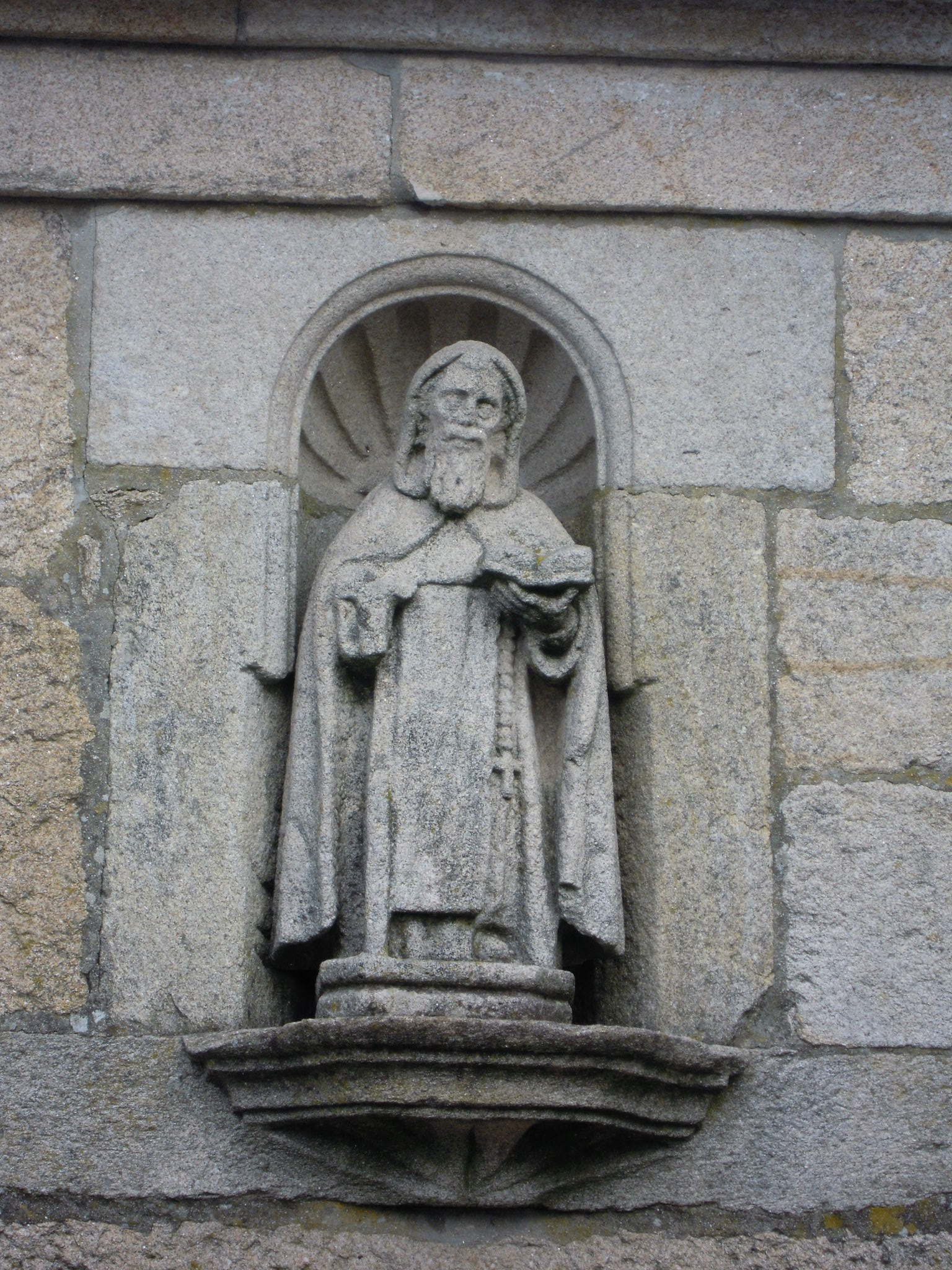 Escultura de Amaro de Anjou na capela de santo Amaro, en Mourente (Pontevedra).